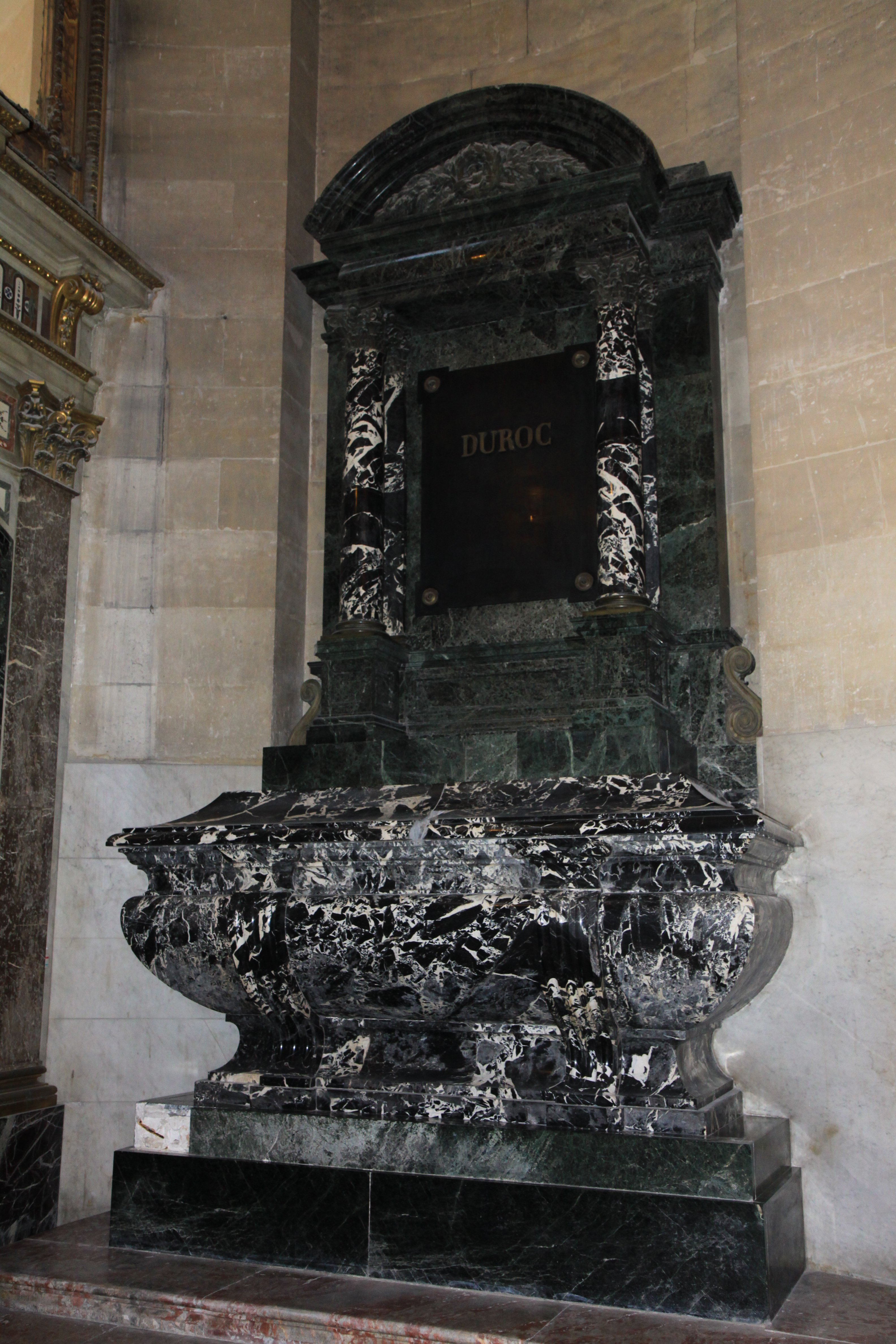 Le tombeau de Duroc aux Invalides. .